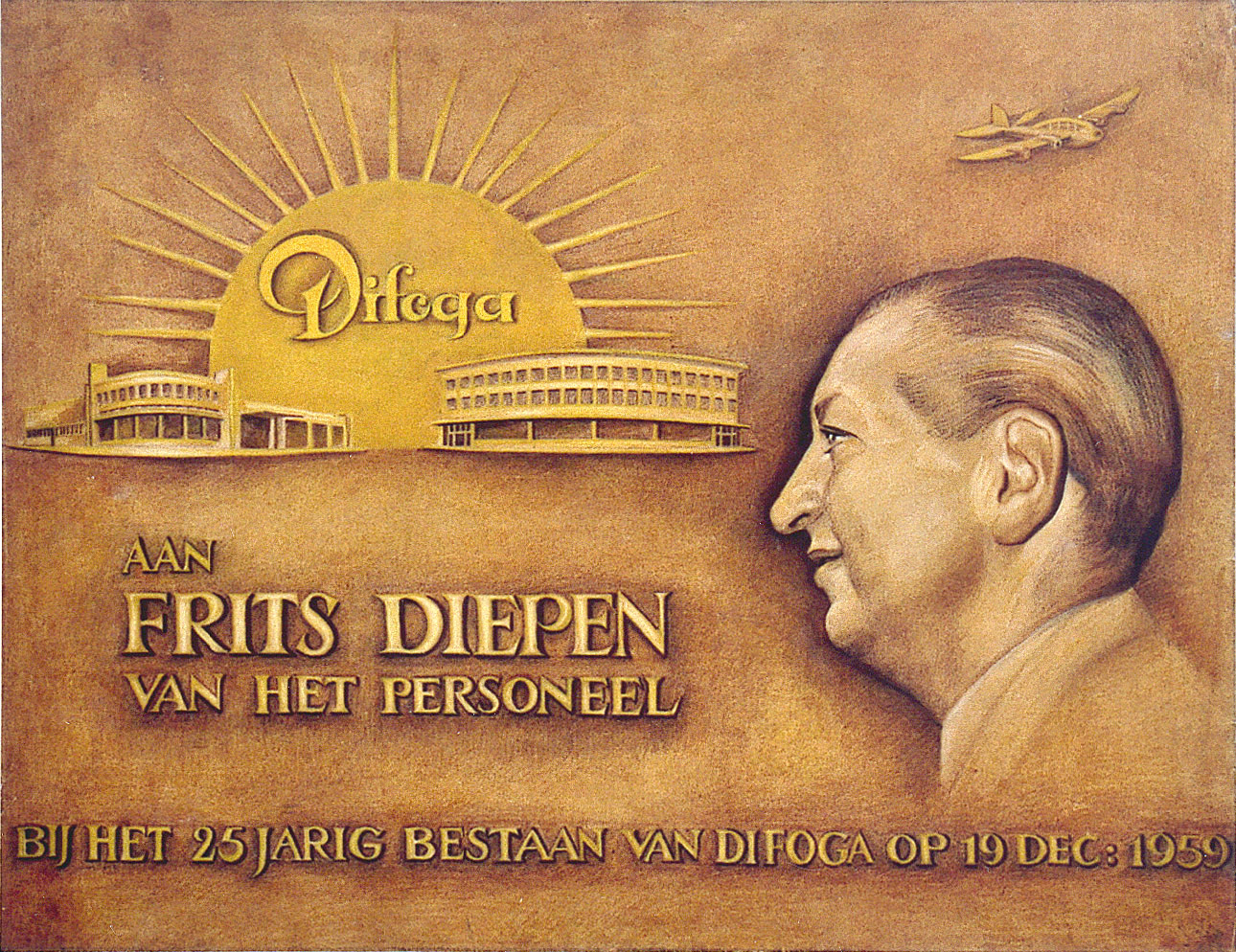 Ontwerp voor een afscheidsplaquette voor Frits Diepen op 19 december 1959 van het personeel van de Difoga garage te Bergen op Zoom ter gelegenheid van het 25-jarig bestaan hiervan. Ontwerp en plaquette zijn door Louis Weijts te Bergen op Zoom gerealiseerd.